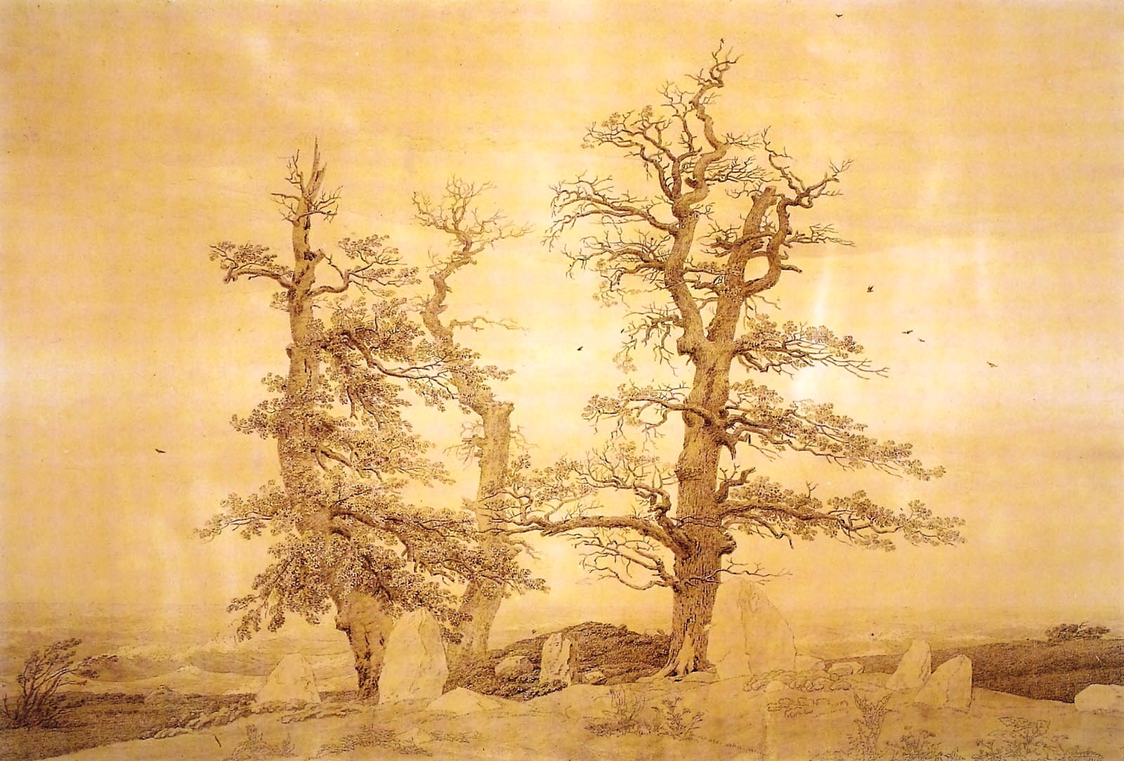 Hünengrab am Meer, 1807, Bleistift, Sepia, 64,5 x 95 cm